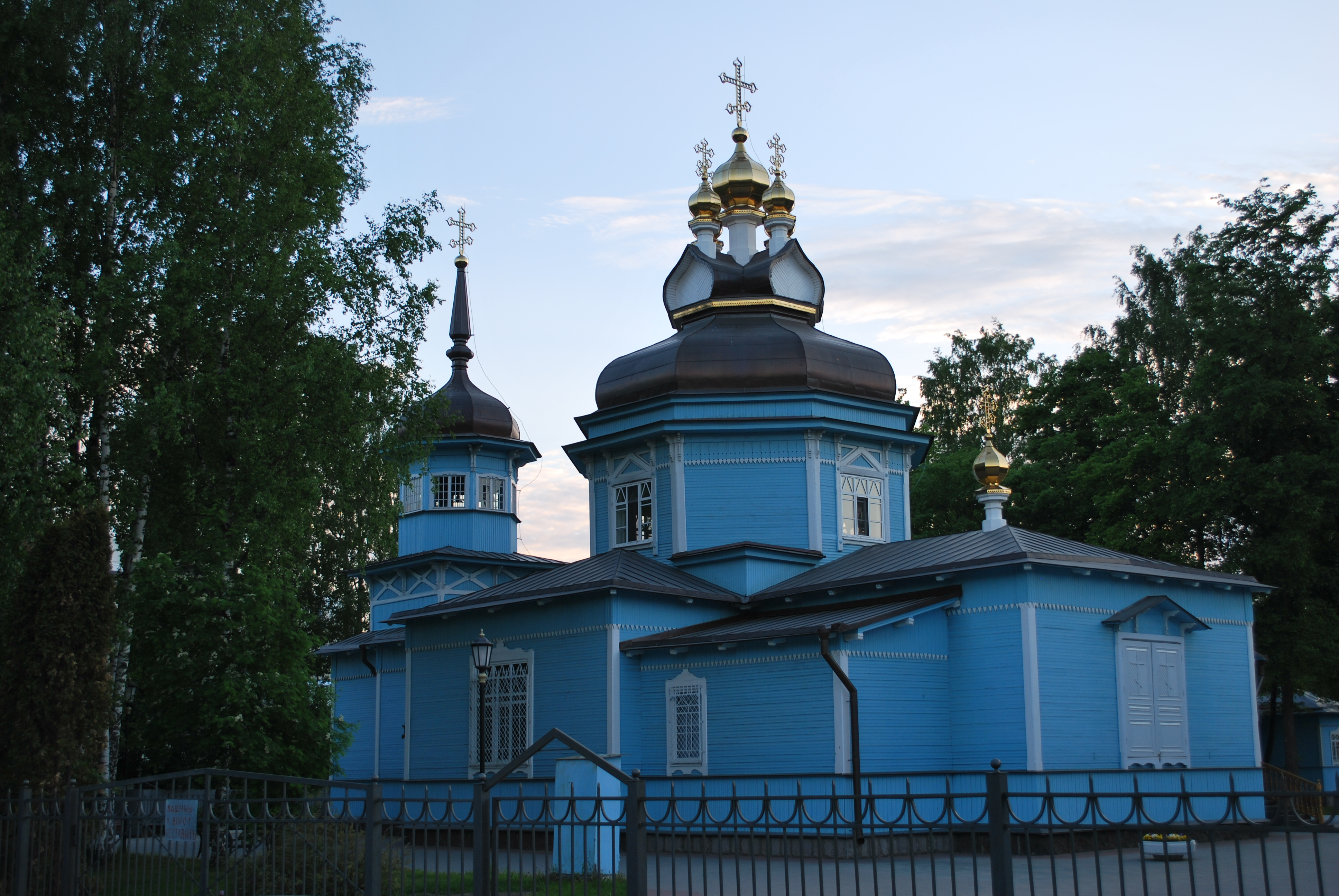 Церковь Дмитрия Солунского в Коломягах